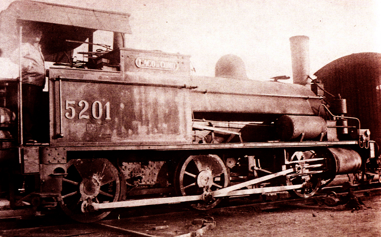 Locomotiva 5201 "Lago di Como" della Rete Mediterranea, poi FS Gr. 815